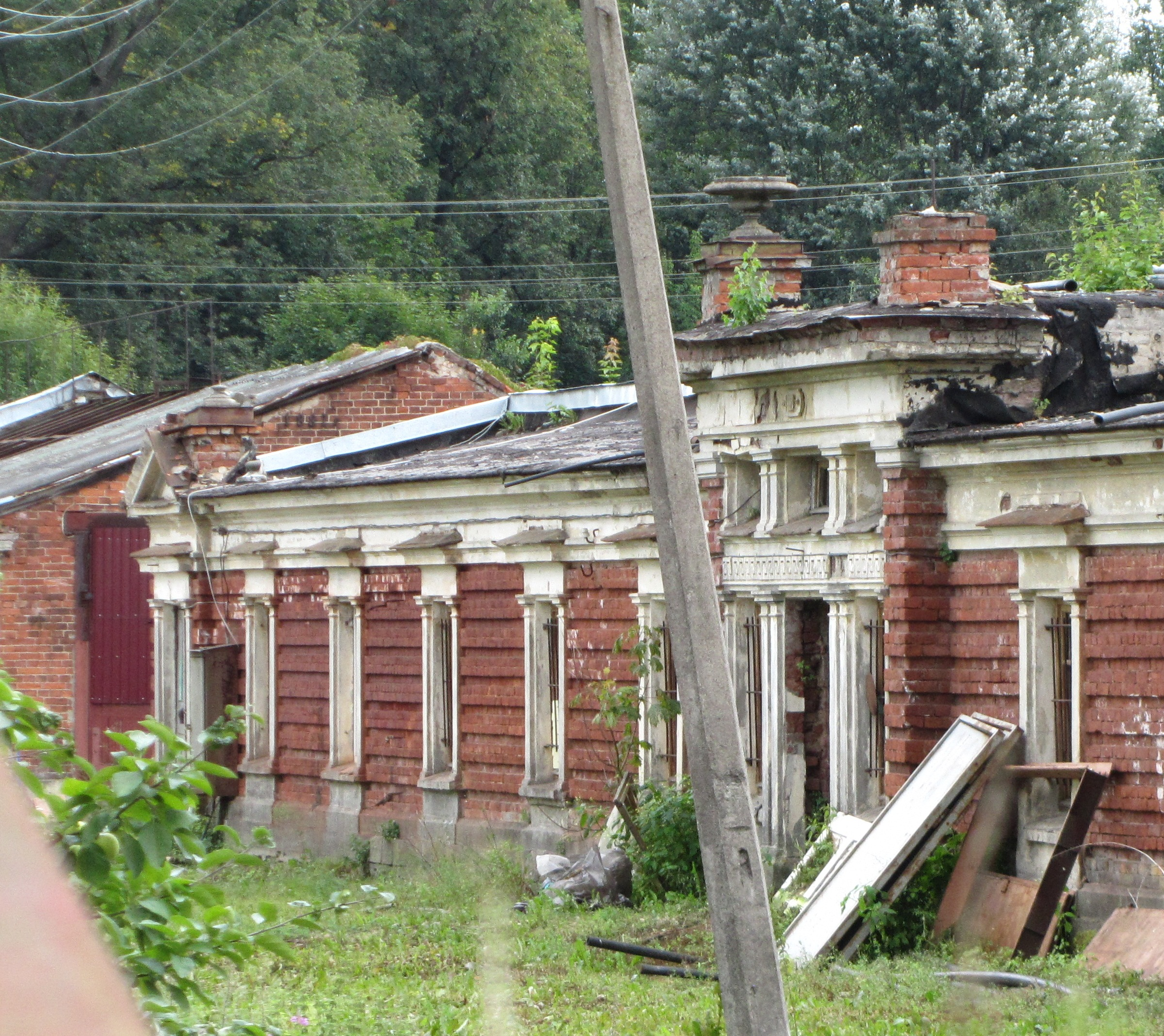 Дворцовые оранжереи (Гатчина) 2014_3